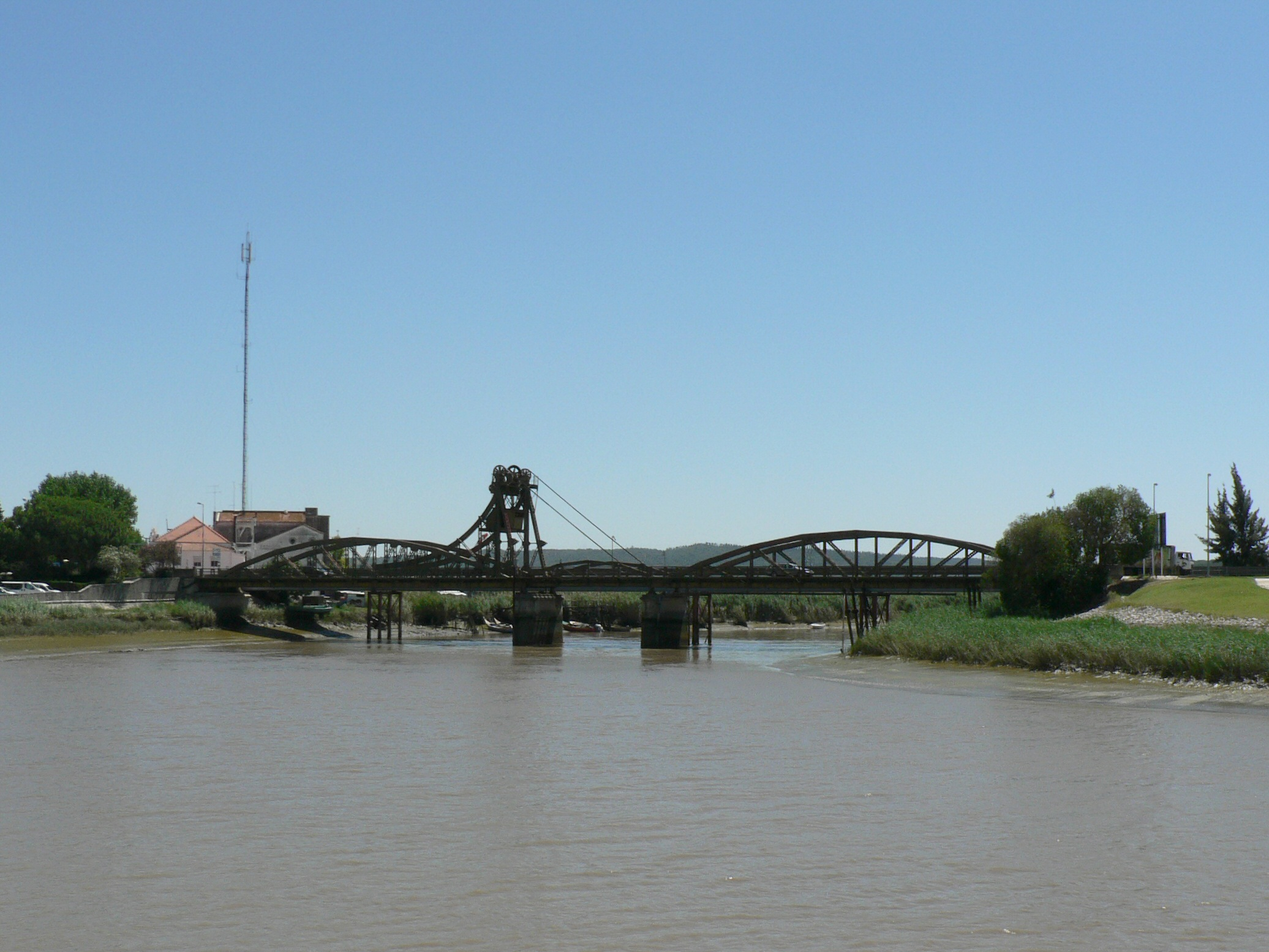 Barco no Rio Sado em Alcácer do Sal